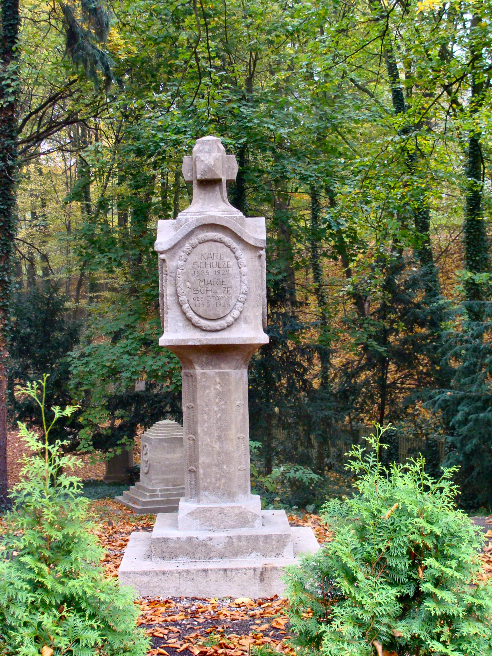 Nagrobek rodziny Schulze na Cmentarzu Centralnym w Szczecinie